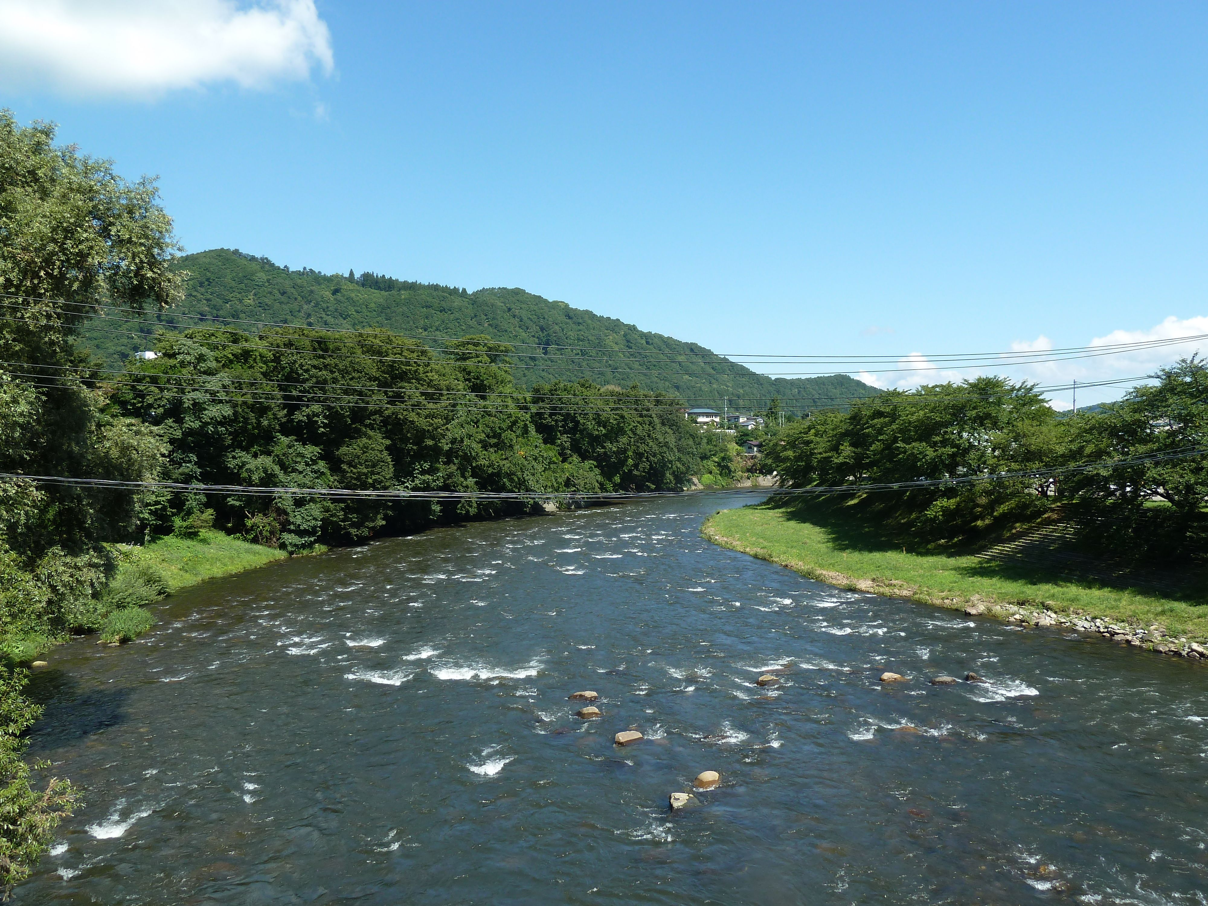 二戸市内を流れる馬淵川